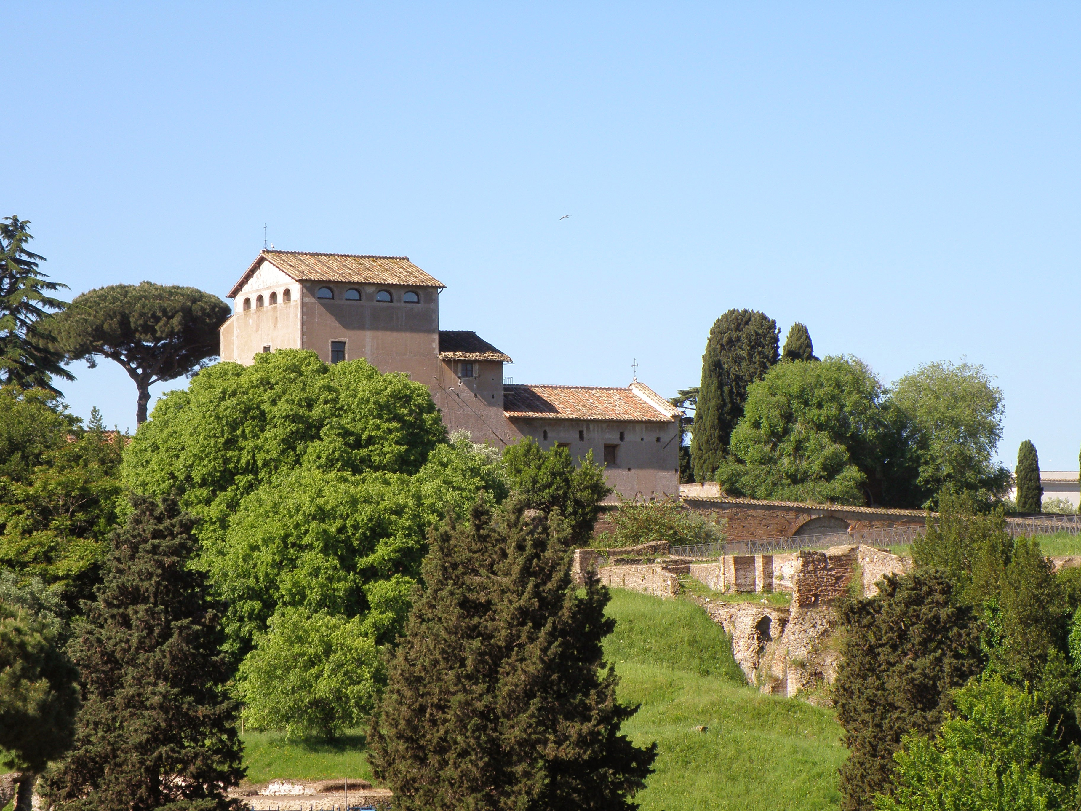 Rione XIX Celio, Roma, Italy